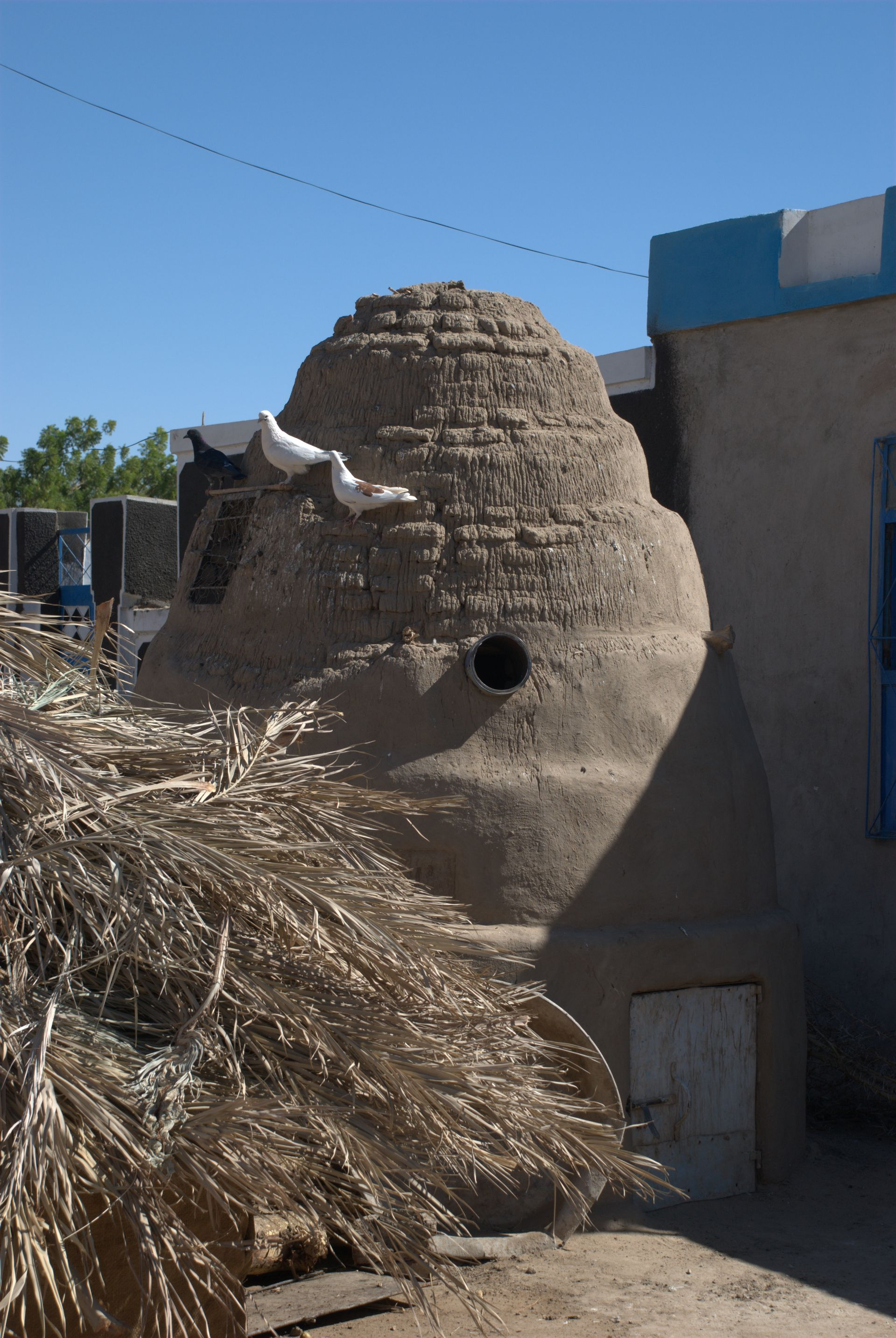 Dovecote near Kerma, Sudan